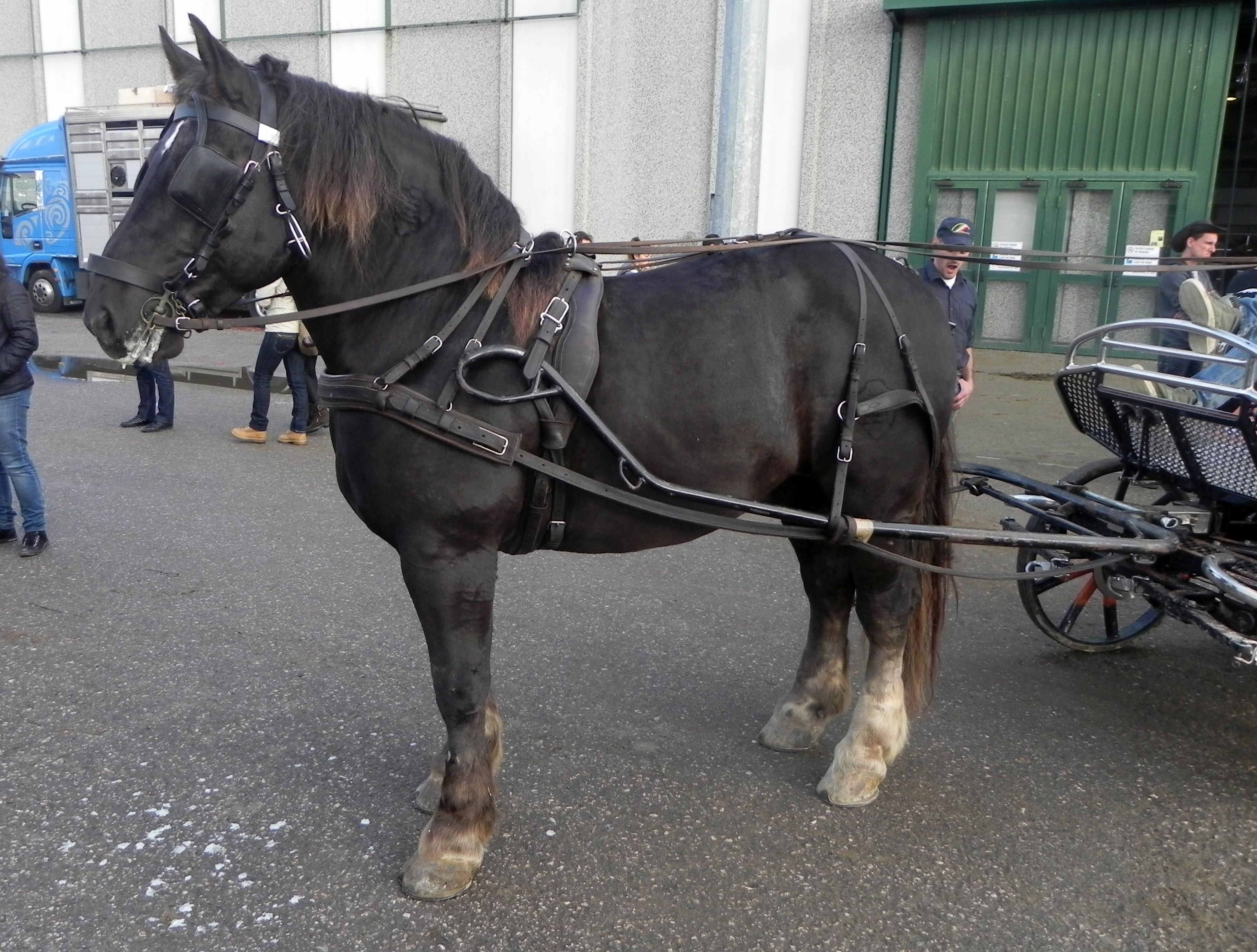 TPR (Cavallo Agricolo Italiano da Tiro Pesante Rapido) in harness, photographed at Fieracavalli, Verona, Italy, on 9 November 2014.